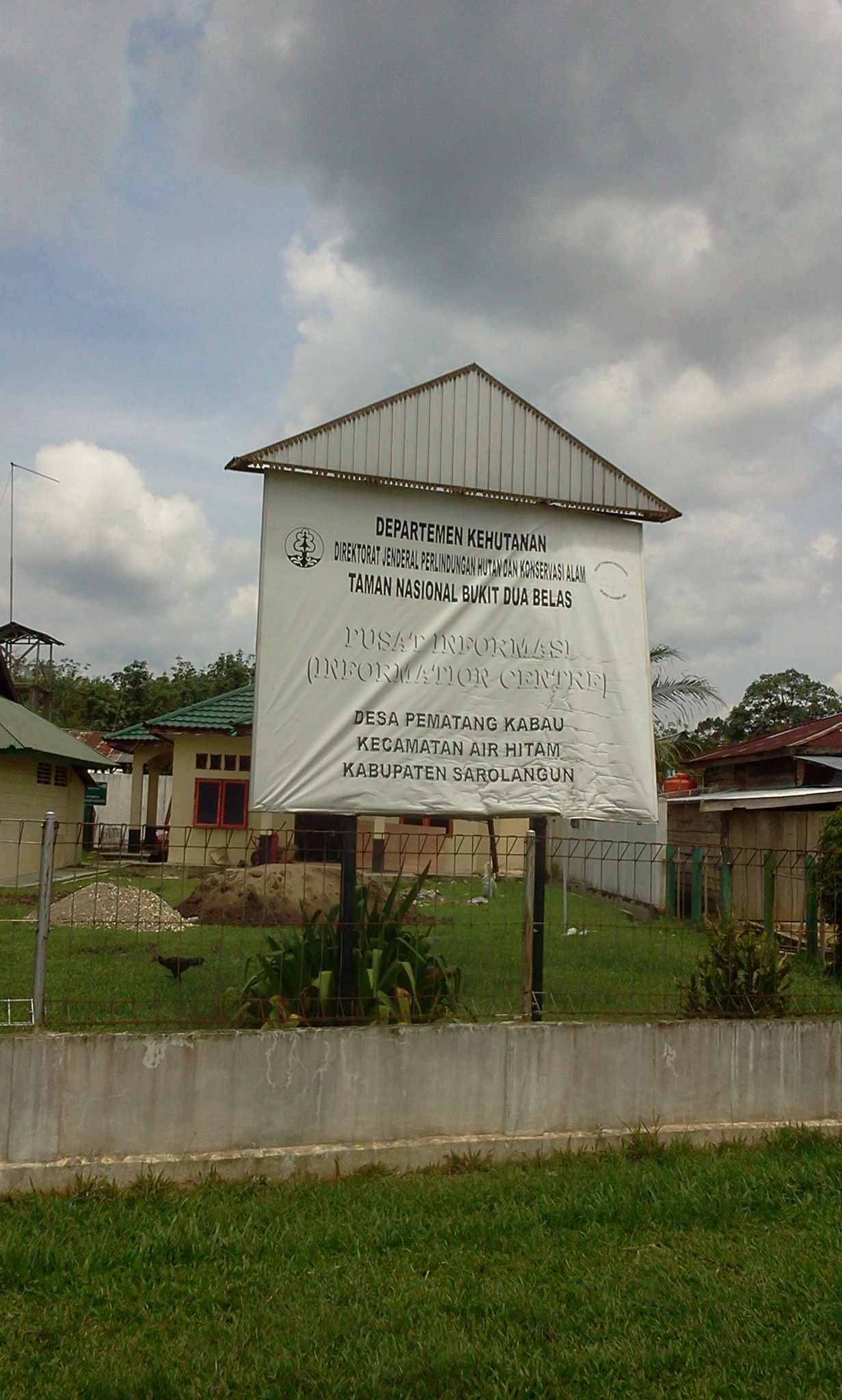 Kantor Kementrian Komunikasi dan Informatika Air Hitam, Sarolangun, Jambi